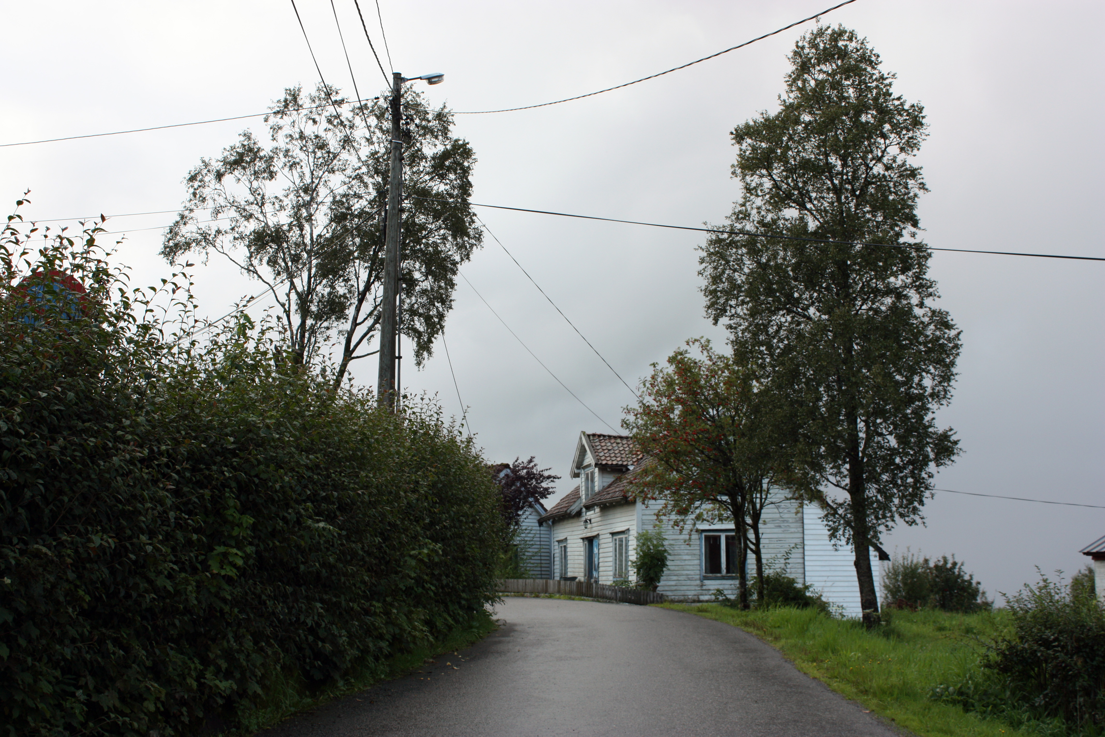 Smørås, Fana, Bergen.